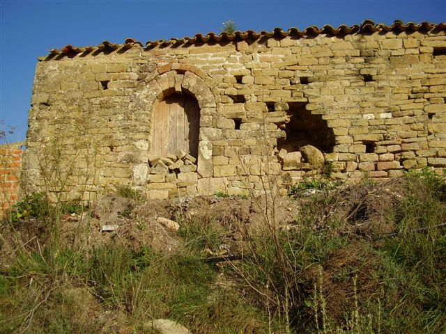 Església de Sant Pere de Mussarra, a Monistrol de Calders